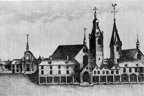 Vue d'une partie de la place de Maubeuge avec l'église Saint-Pierre et Sainte-Aldegonde au XVIIIe siècle, d'après un dessin de l'époque.Au fond à gauche, la chapelle des Soeurs Noires (actuelle bibliothèque municipale).